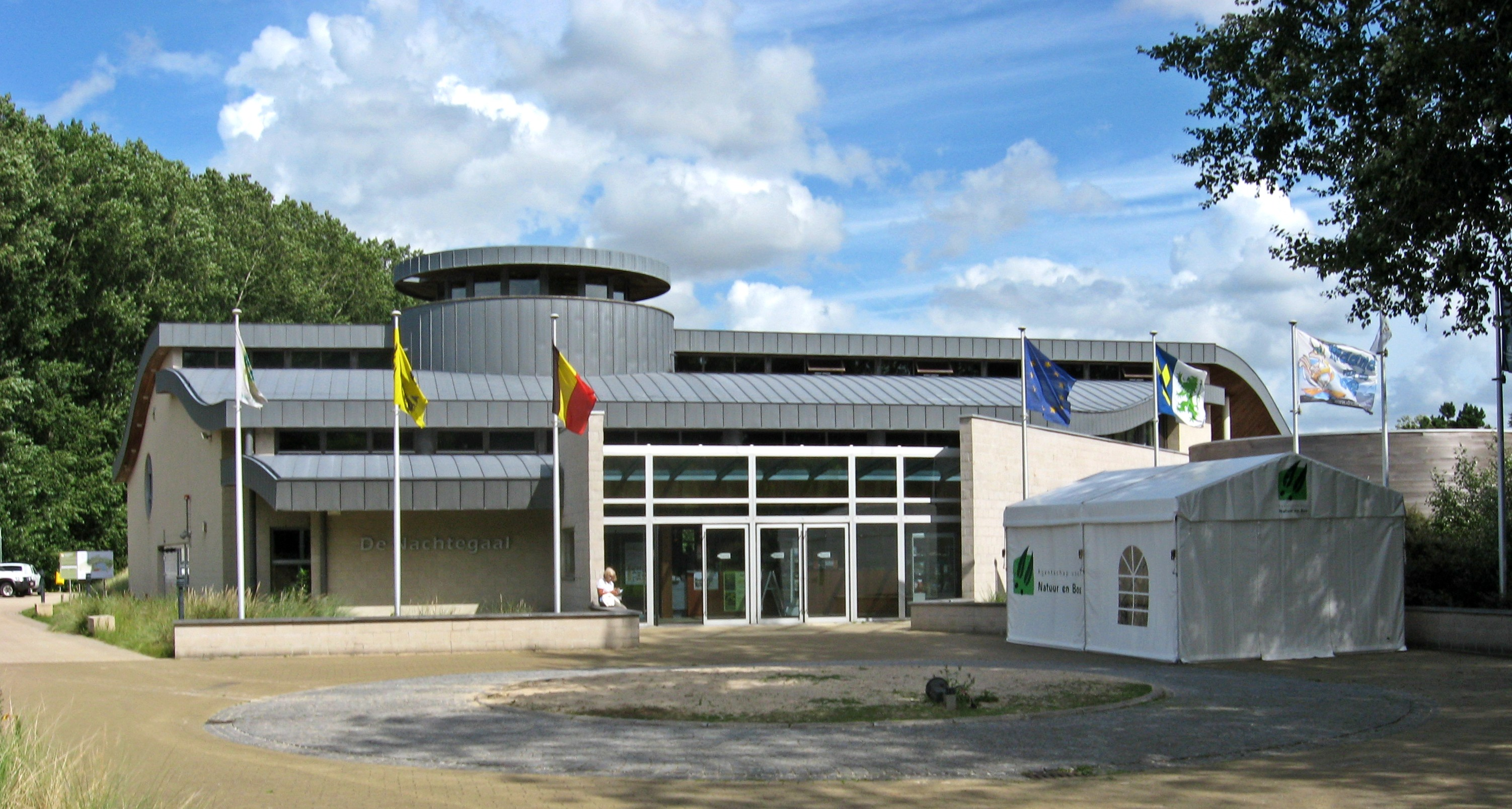 Vorderseite des Naturparkzentrums De Nachtegaal (Die Nachtigall) in einem Museum von De Panne